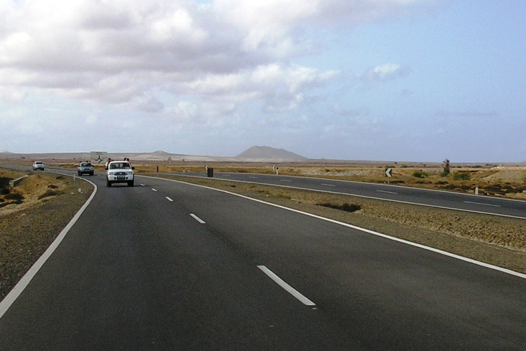 Road Espargos-Santa Maria in Sal island, Cape Verde